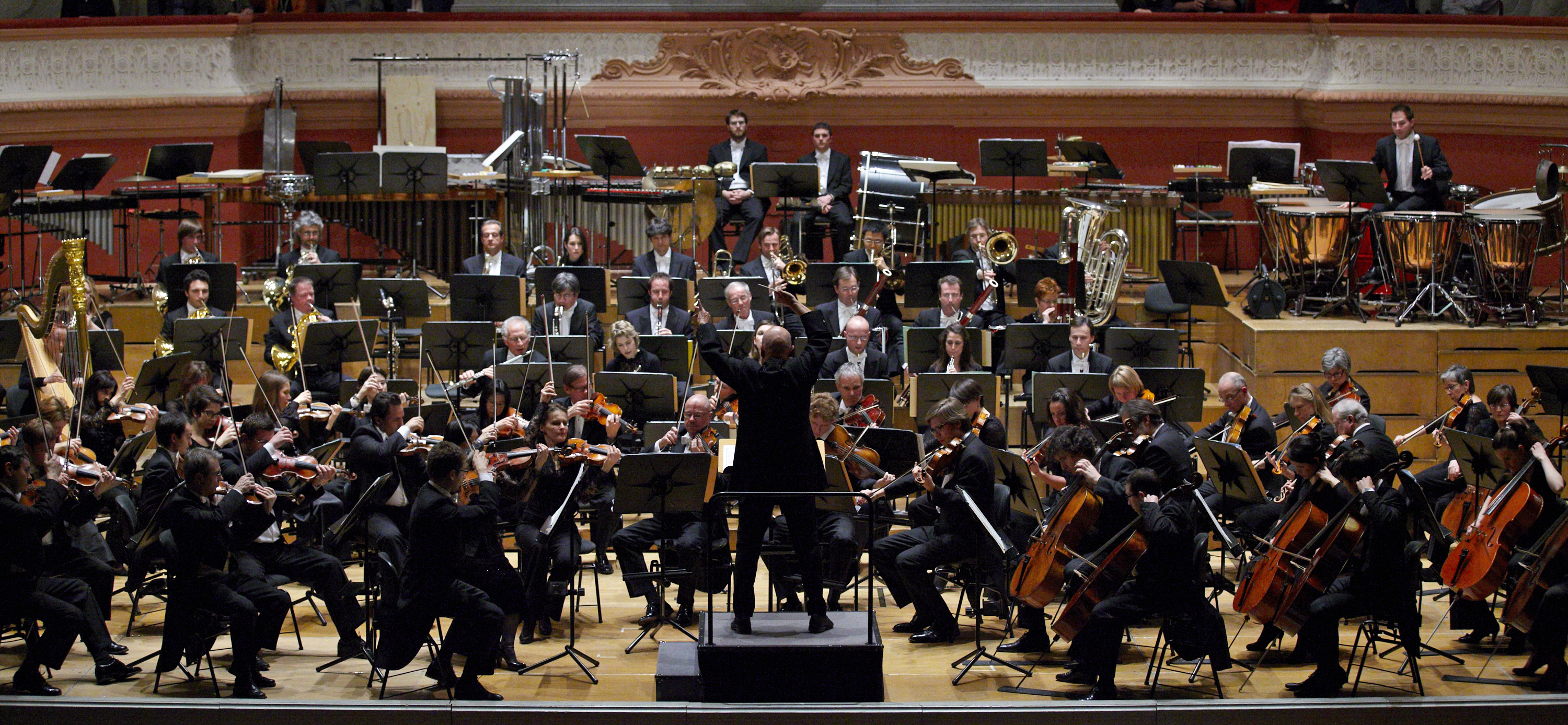 Das Sinfonieorchester Basel im Musiksaal des Stadtcasinos Basel.